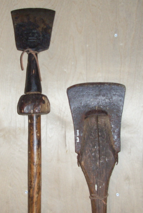 Nærbilete av barkespadar utstilte på Norsk skogmuseum på Elverum